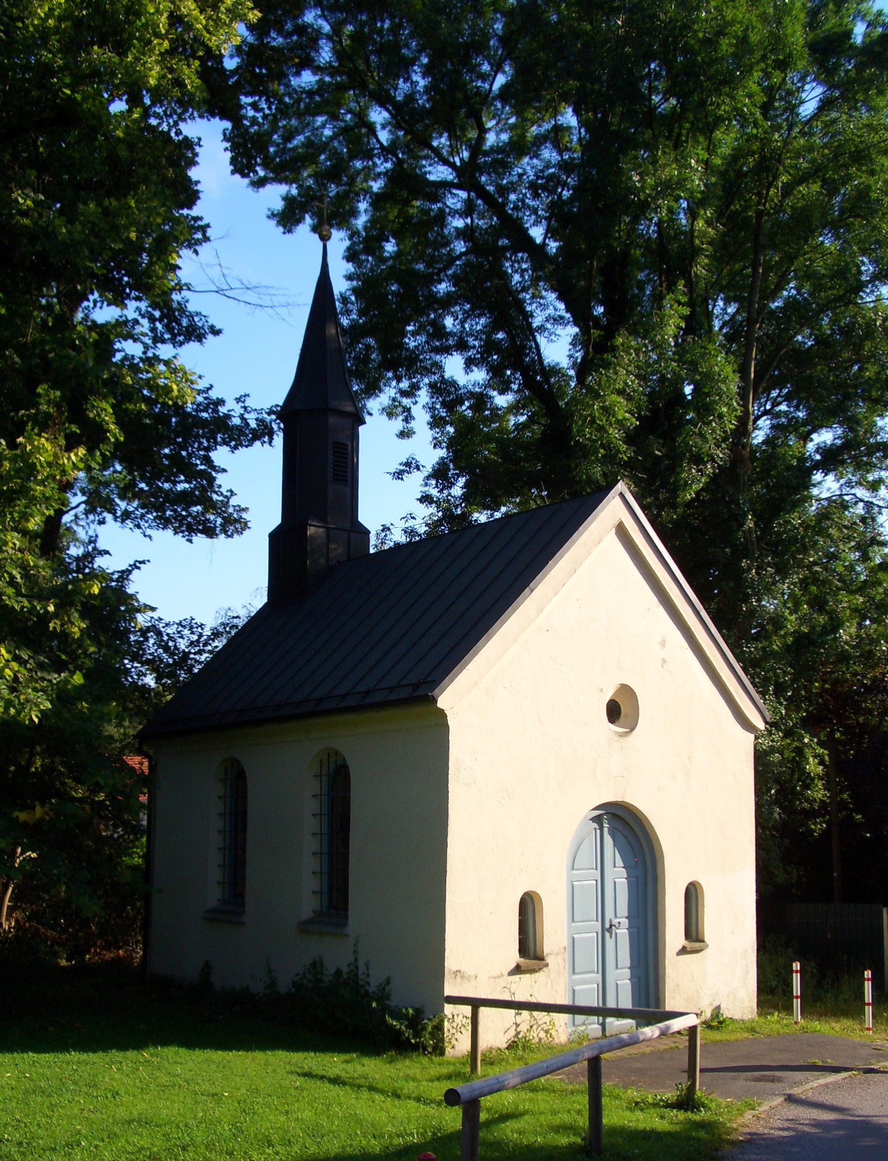 St.-Emmeram-Gedächtniskapelle in München-Oberföhring